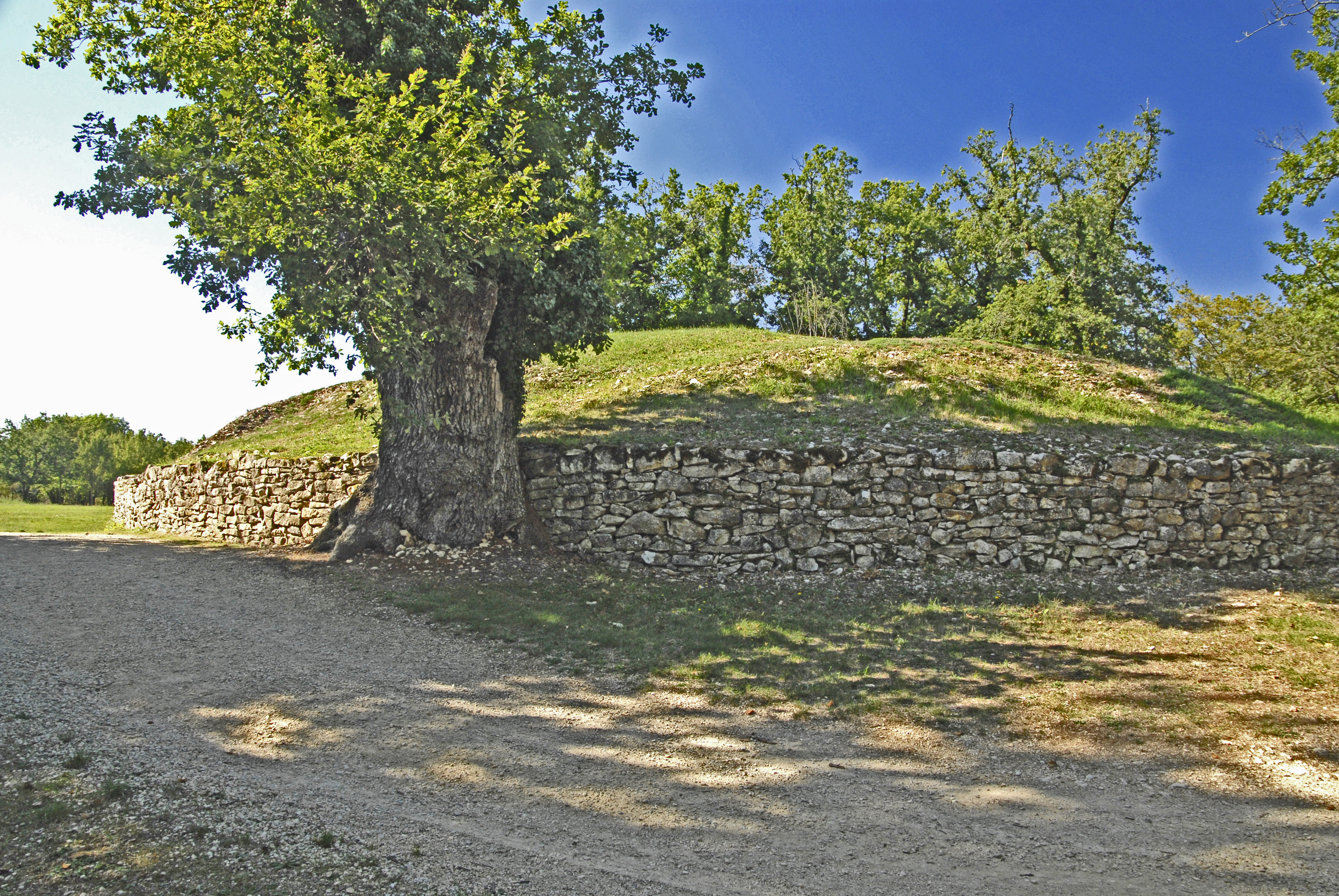 Tumulus A, Rückseite